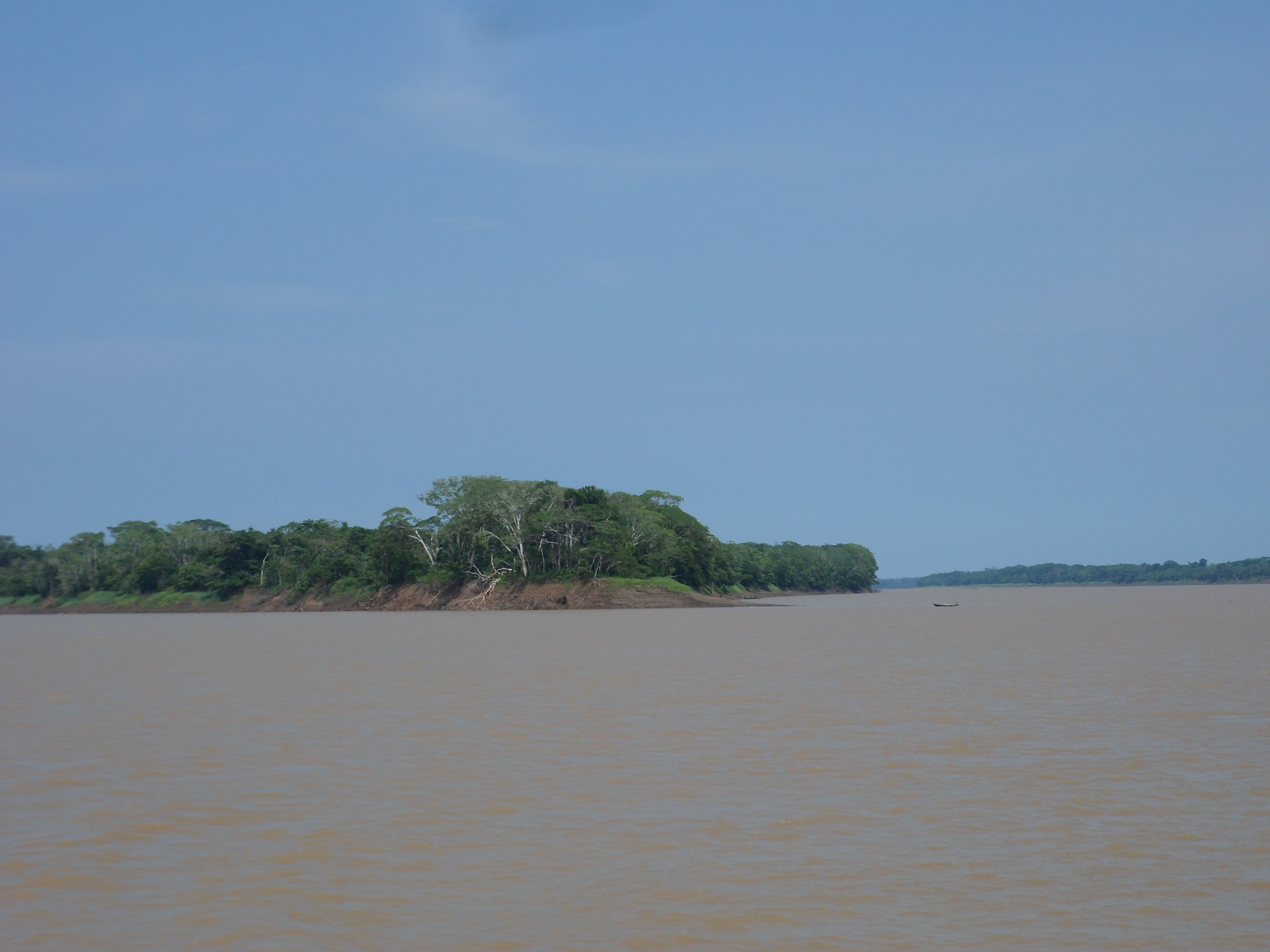 Navegando no rio Purús